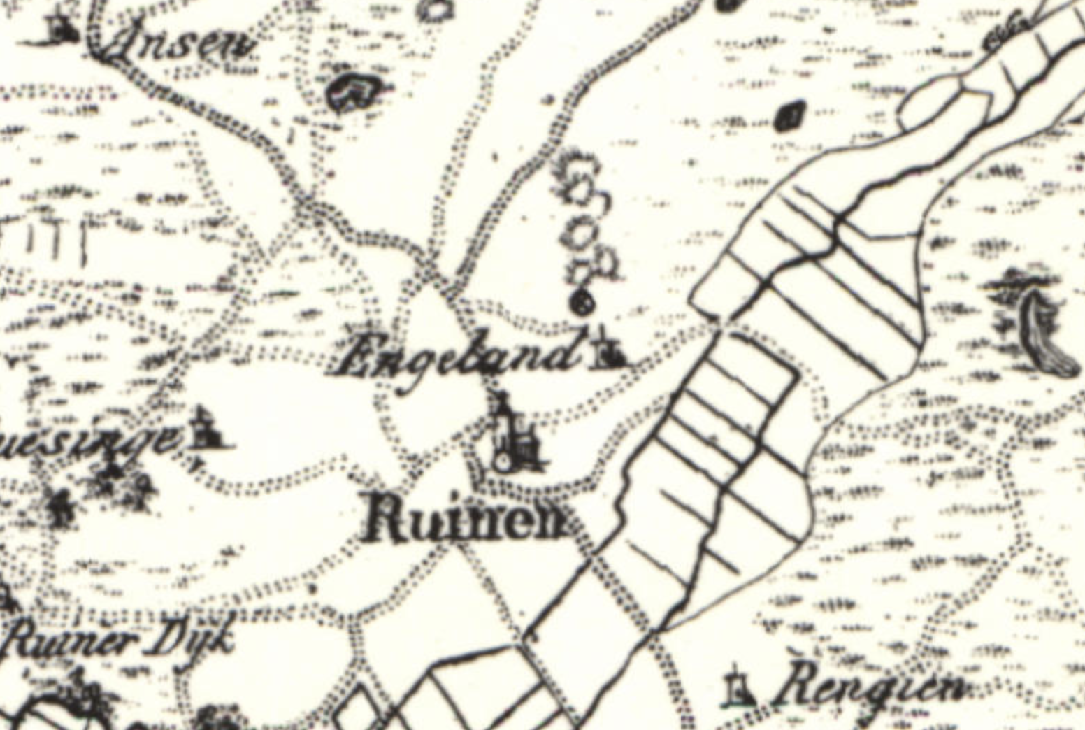 topografische kaart - detail omgeving Ruinen - circa 1820